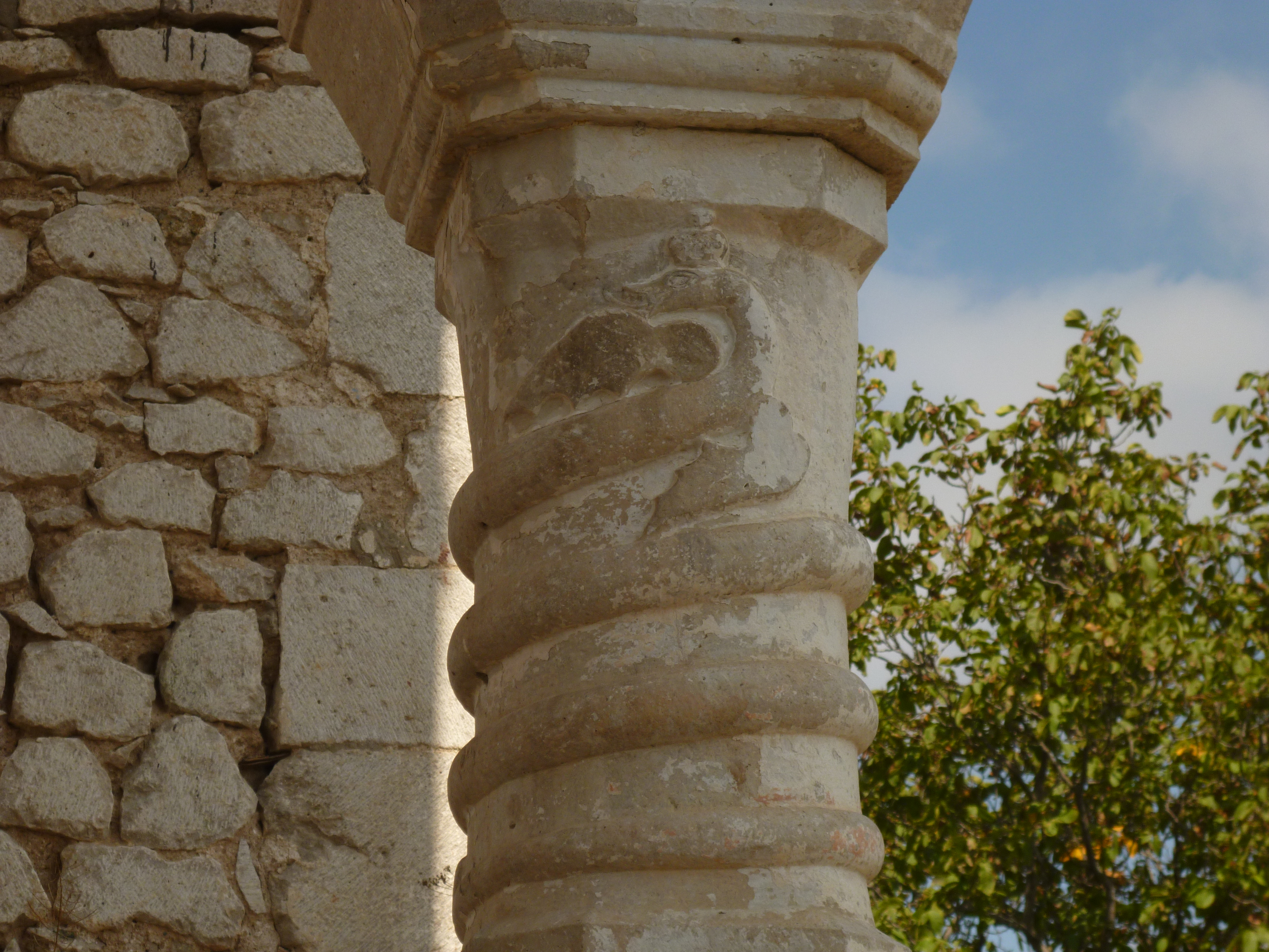 Şuşa şəhərində Xan sarayı. XVIII əsr. A.Qaraşərov küçəsi, 68